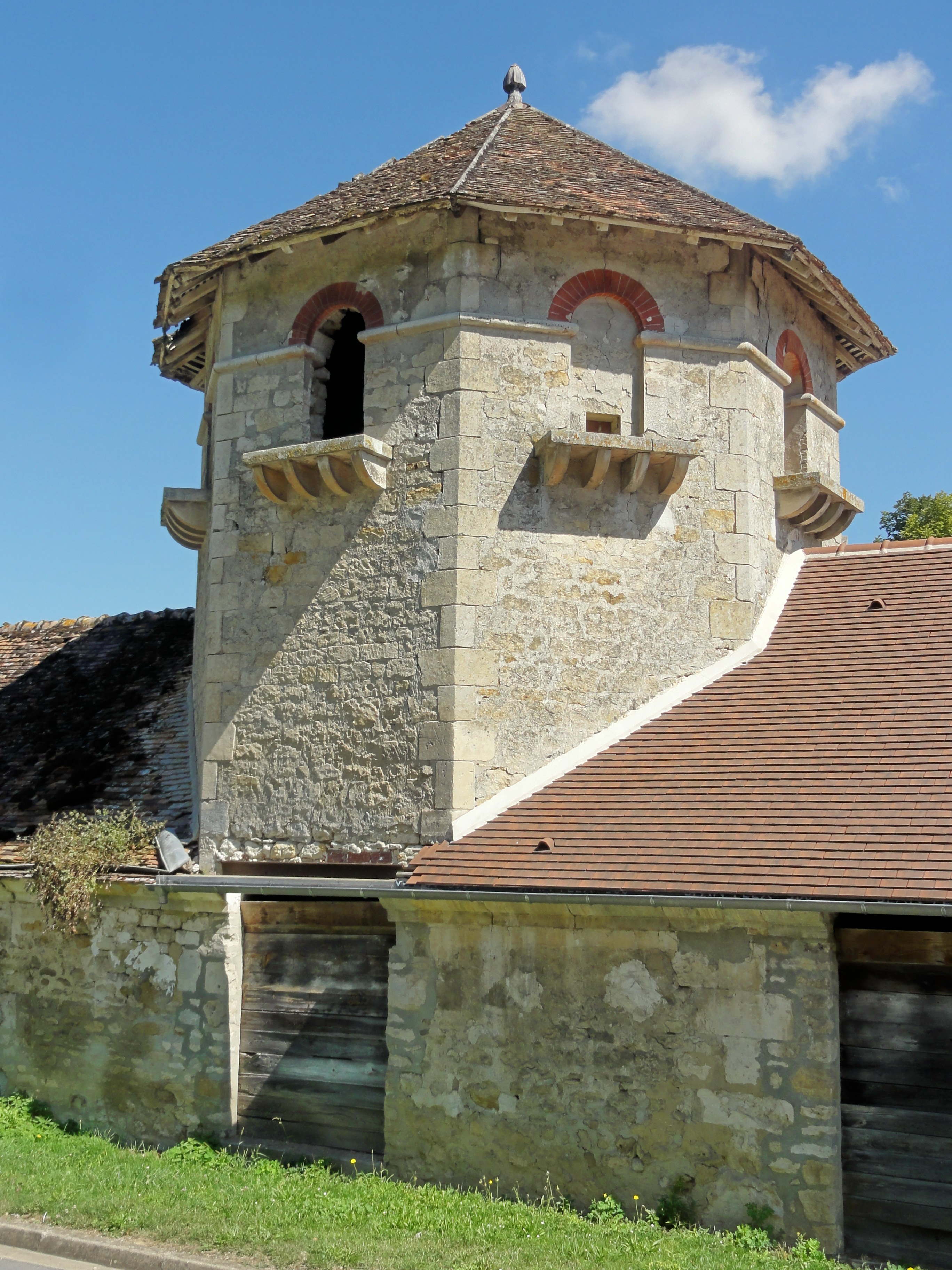 Ferme-manoir du Petit-Château.